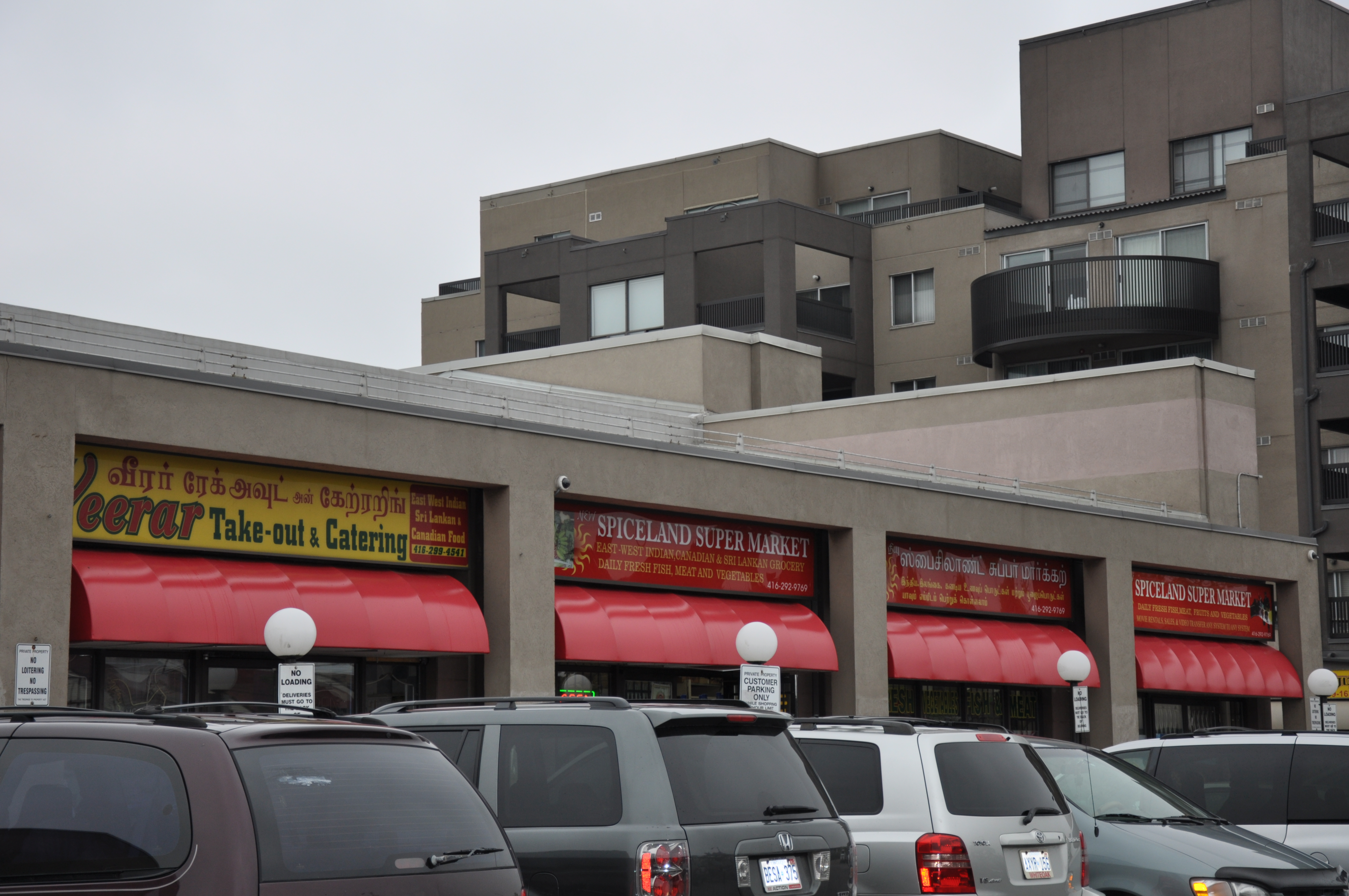 டொராண்டோவில் தமிழ் அங்காடிகள்